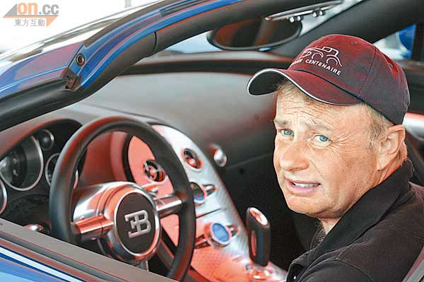 Loris Bicocchi al volante di una Bugatti Veyron